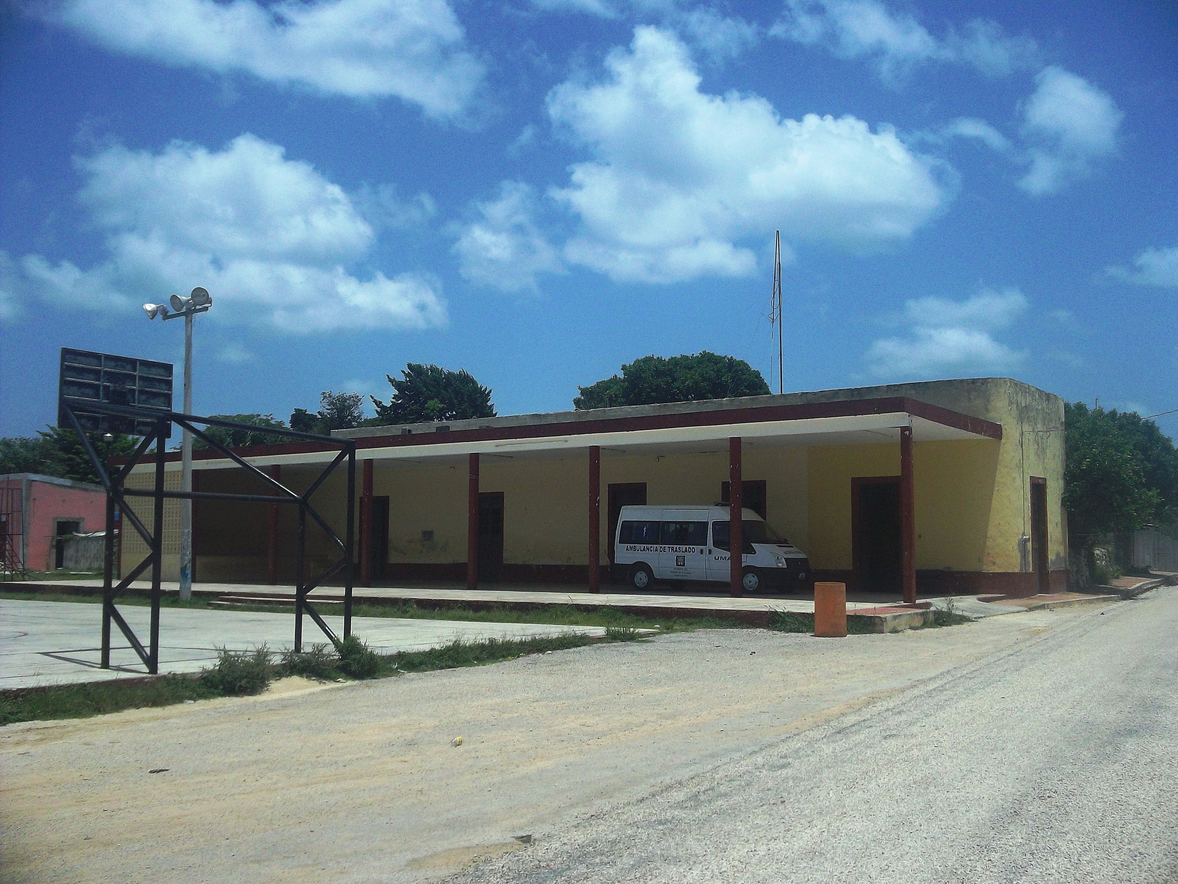 Casa comisarial de Bolón, Yucatán.